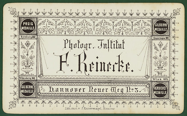 Rückseite einer Carte de Visite von Friedrich Reinecke, Neuer Weg 3 in Hannover mit Hinweis auf vier Aufzeichnungen.